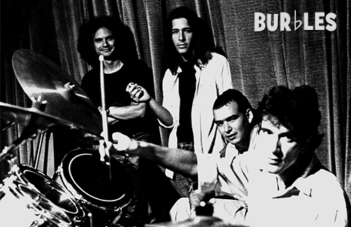 Burbles Band